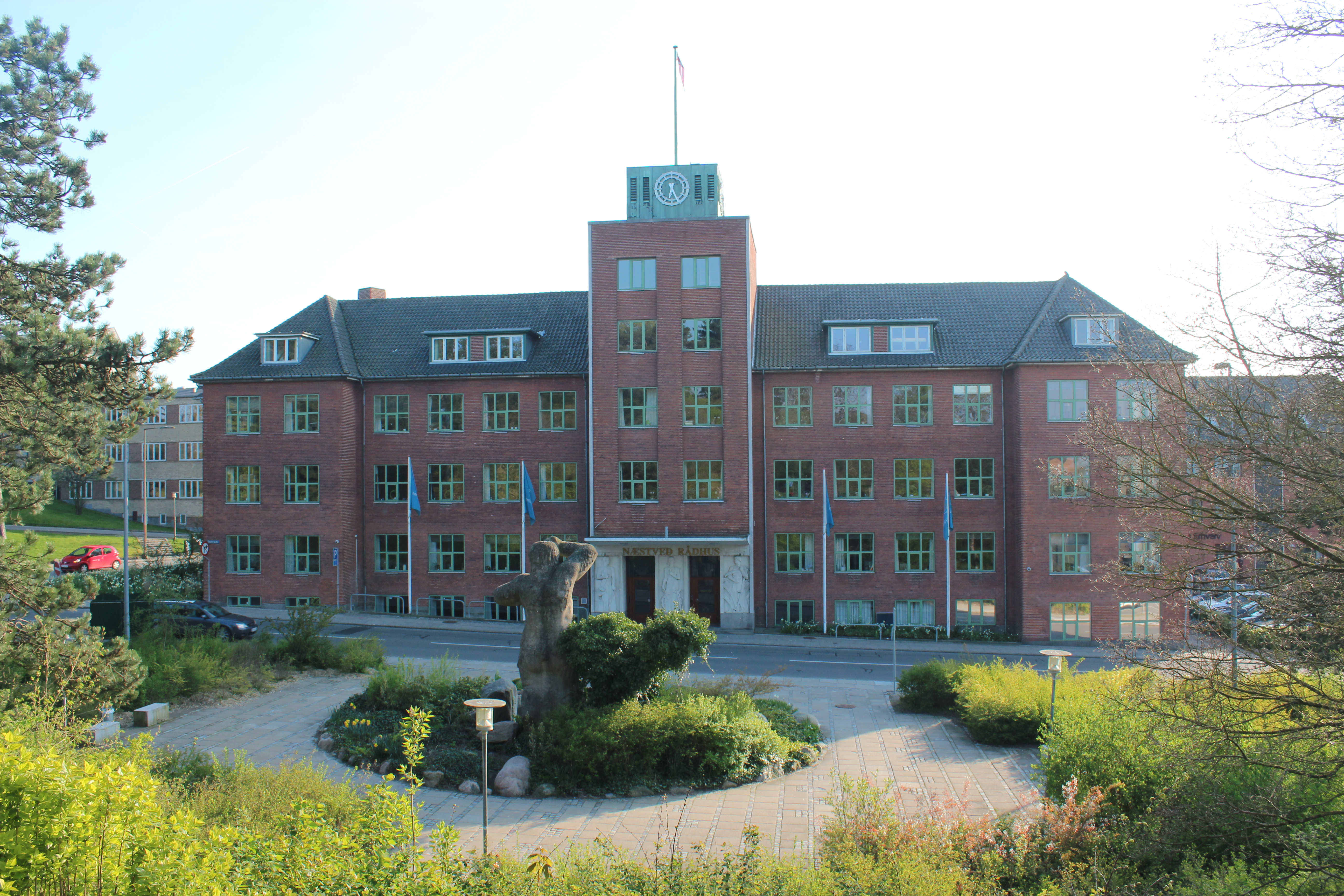 Næstved Rådhus i Teatergade 8, der blev opført i 1939-1940. I forgrunden ses Trolden der blev udført af Arne Bang i 1944.